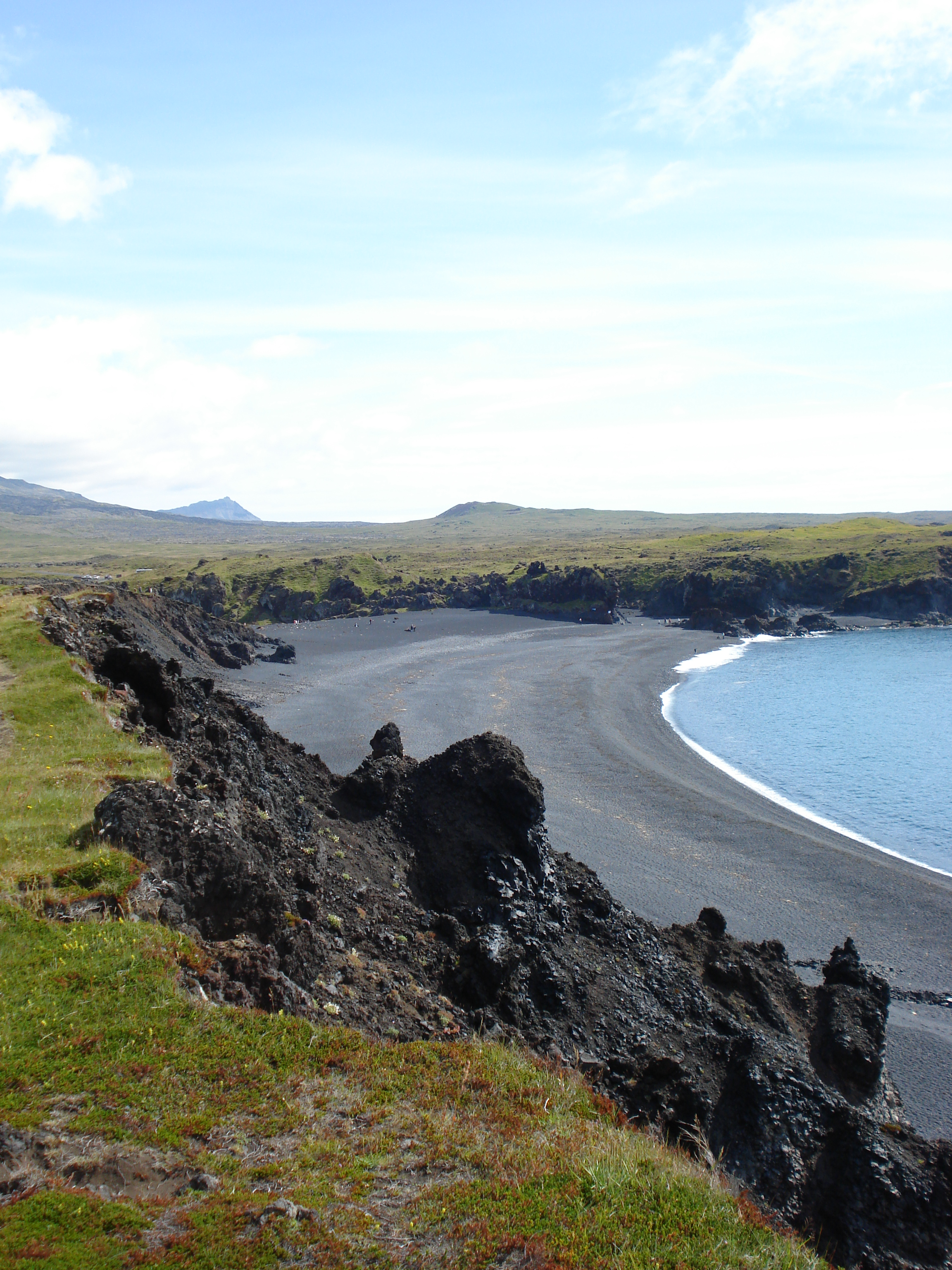 Djúpalónssandur, Iceland